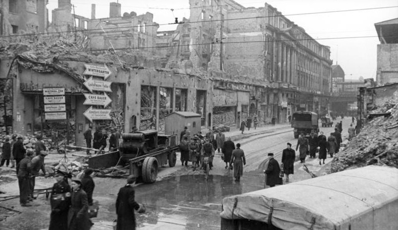 Berlin, Zerstörungen in der Friedrichstraße ADN-ZB/Archiv 9.4.1945 Berlin, im Frühjahr 1945 Die westliche Seite der Friedrichstr. zwischen Dorotheestraße und Bhf. Friedrichstr. - In diesem Block befand sich das bekannte Kabarett Wintergarten.